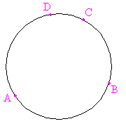 Autor: Usuario:Romero Schmidtke De